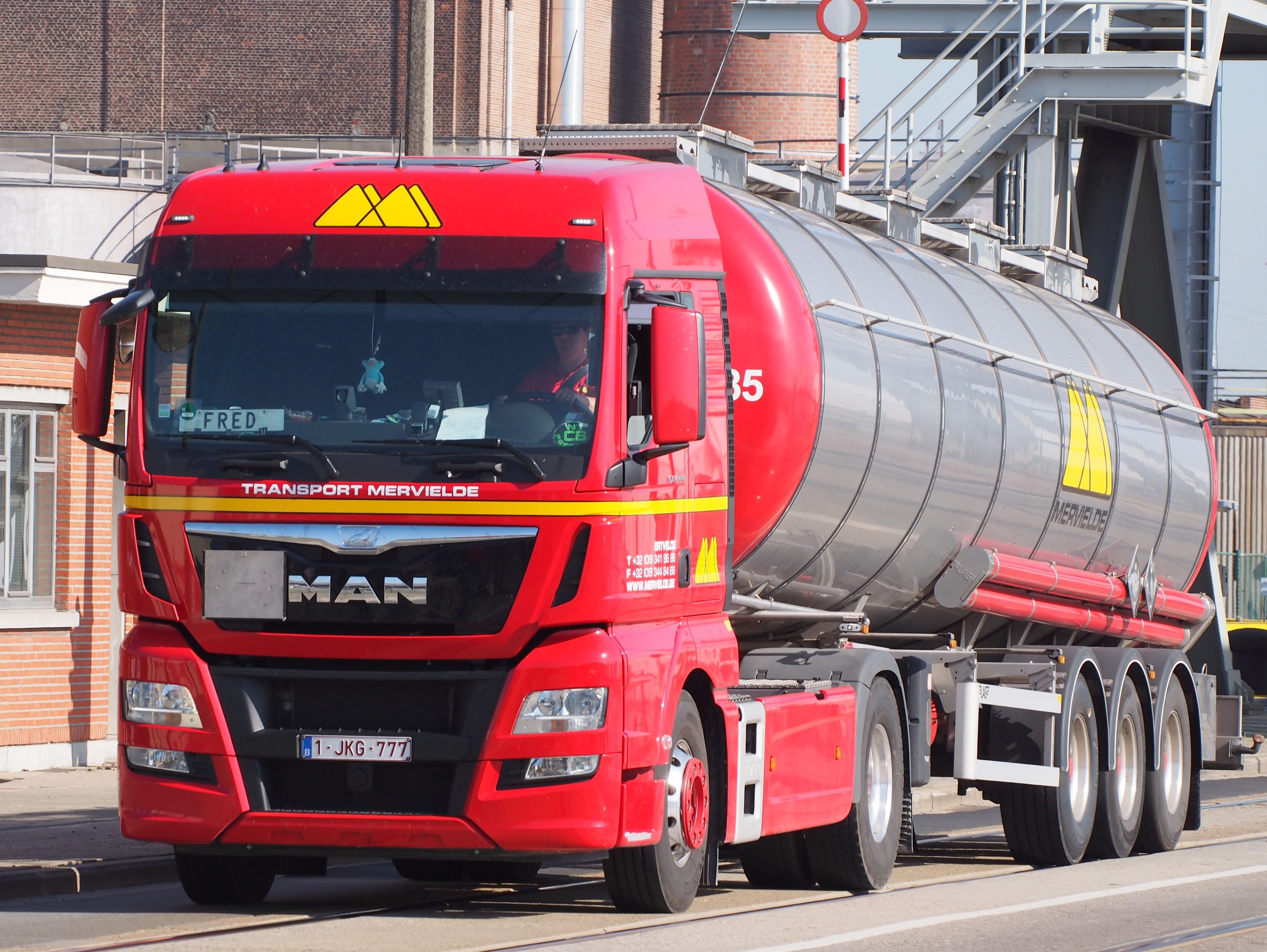 MAN Transport Mervielde.